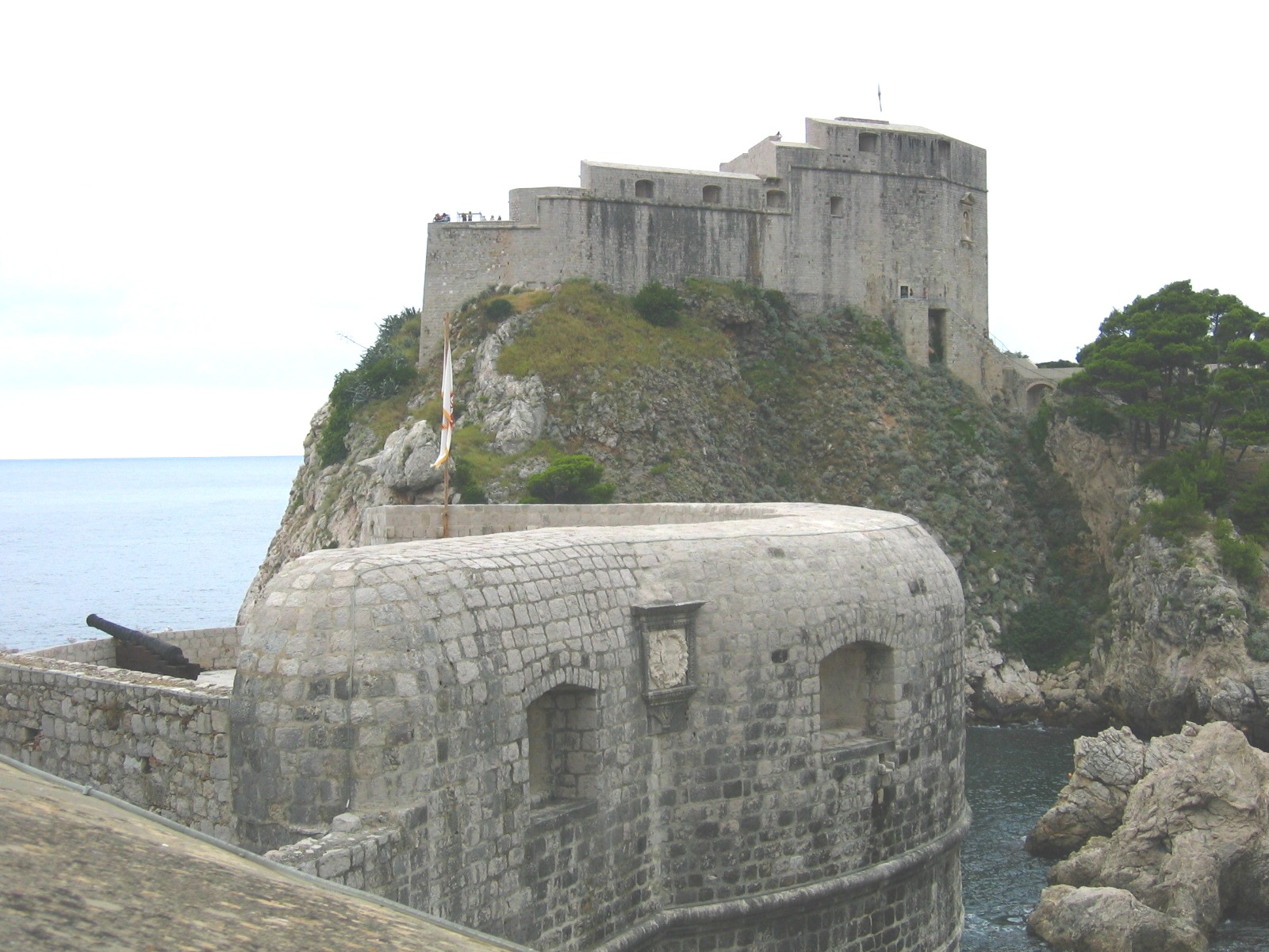 Lovrijenac tower, Dubrovnik, Croatia